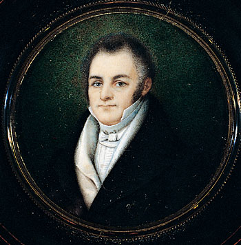 Portrait of Gian Domenico Romagnosi